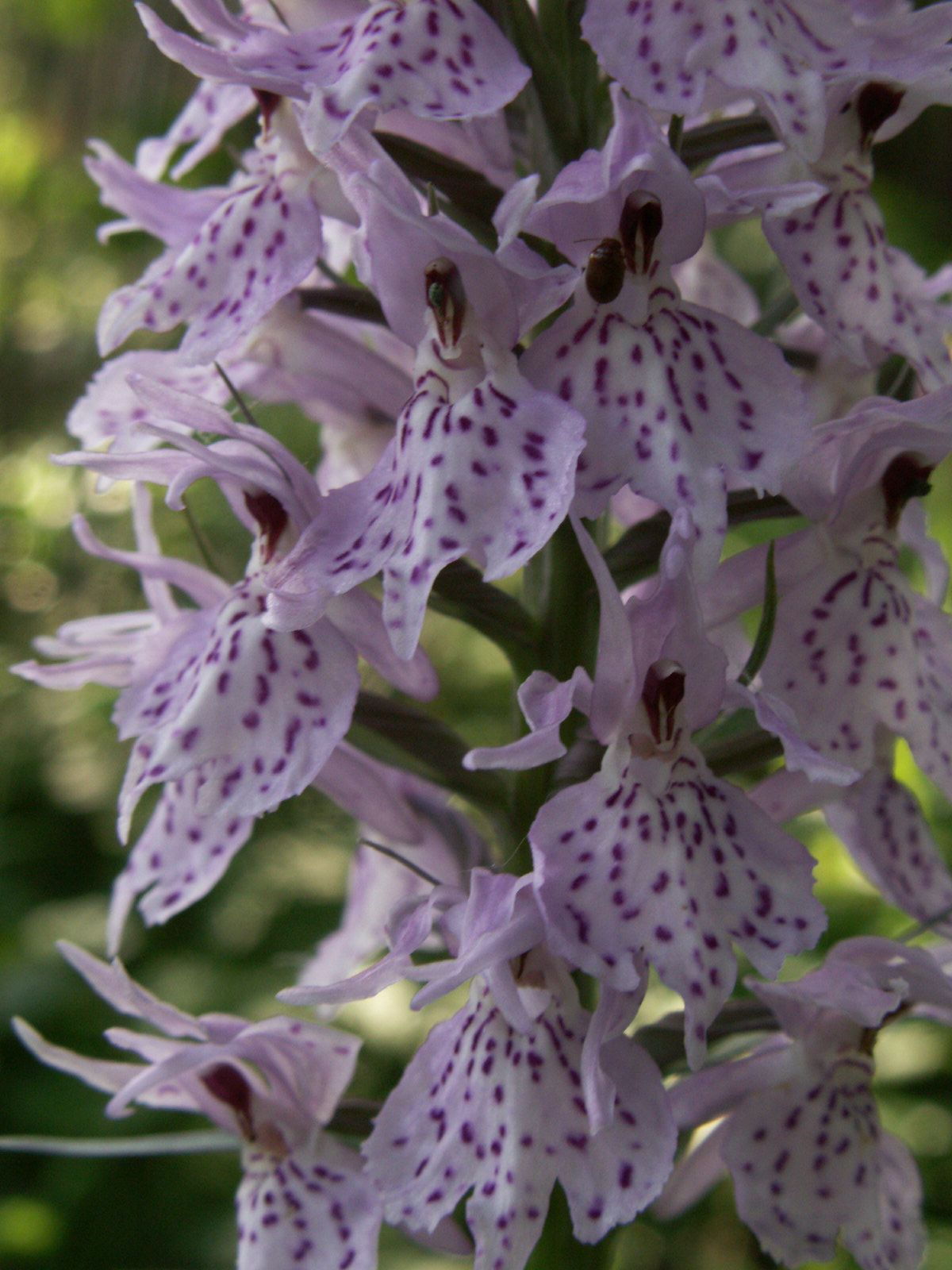 Dactylorhiza fuchsii, Lithuania